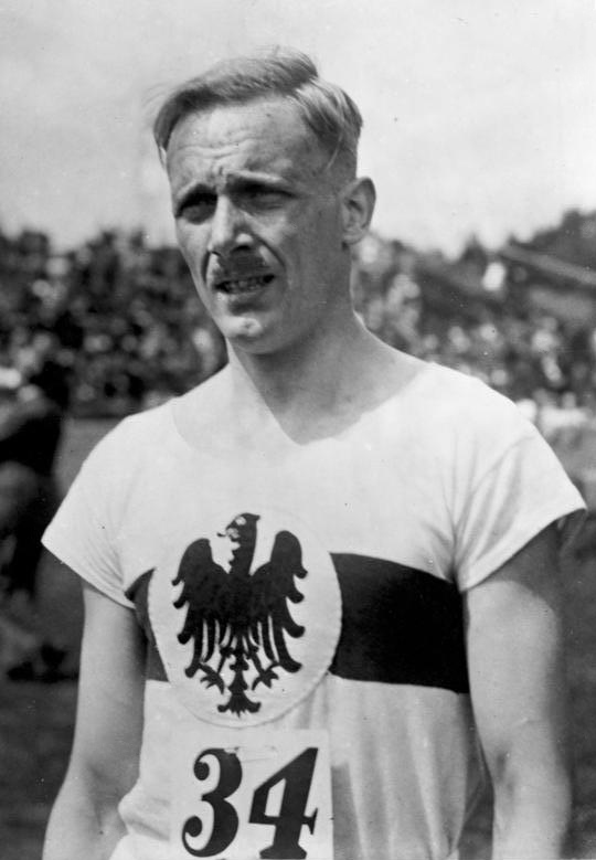 Internationale Hoffnungen für die bevorstehende große Olympiade in Amsterdam ! Der deutsche Weltrecordmann Dr. Peltzer, unsere größte Hoffnung auf der kommenden Olympiade in Amsterdam.